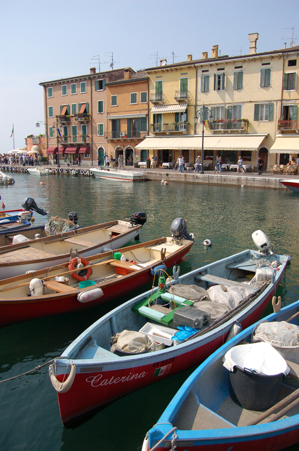 Porto antico di Sirmione